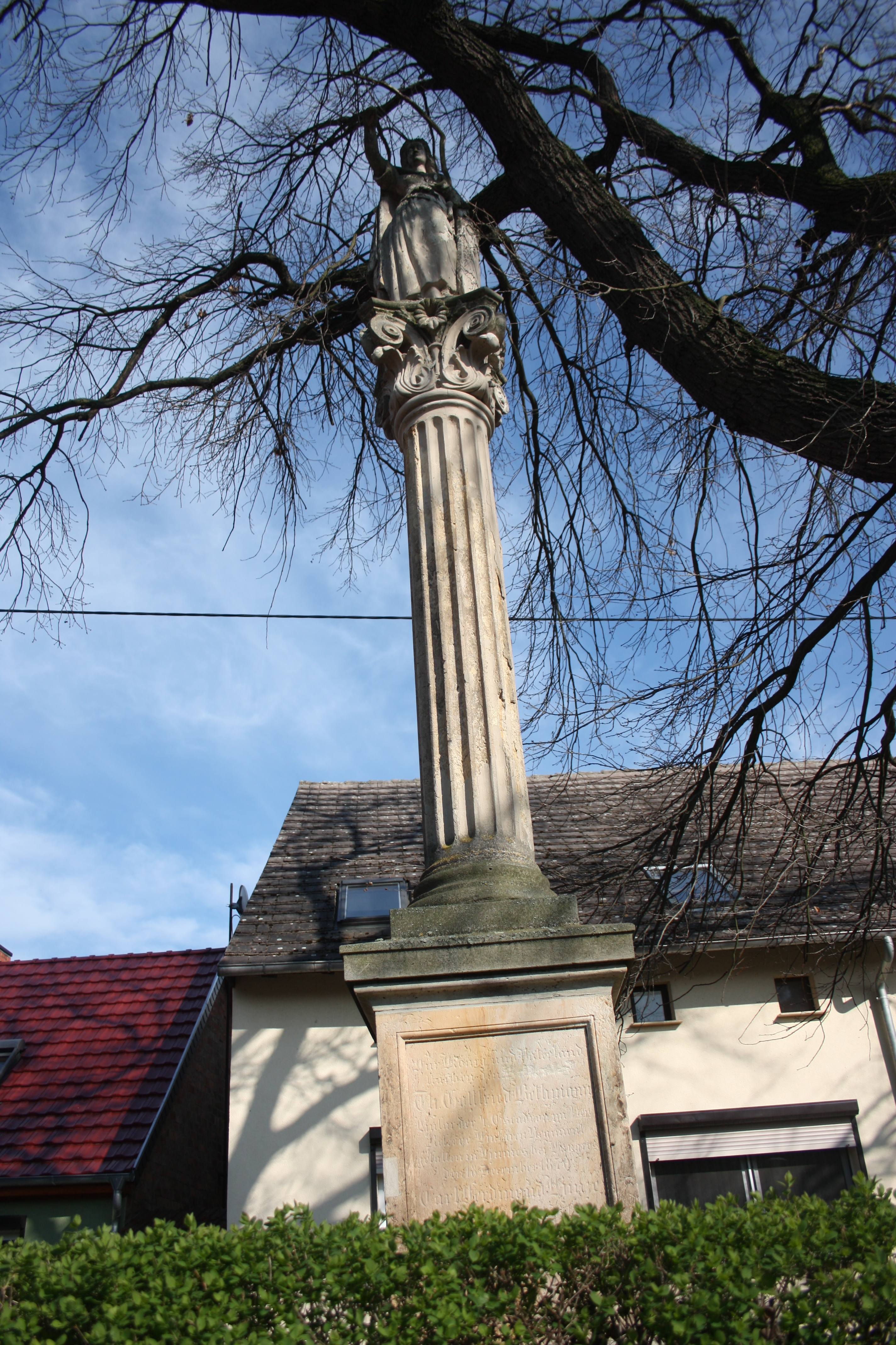 eine Säule mit Statue oben drauf in Döblitz, Saalekreis